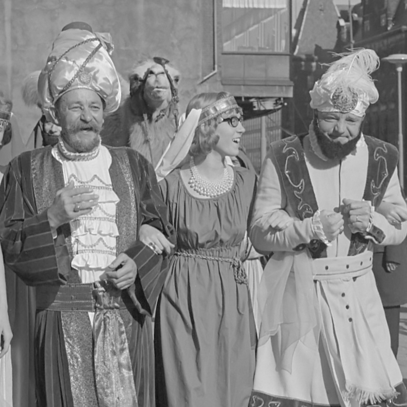 Platenmarkt in Bijenkorf te Rotterdam, de Wama's 8 oktober 1963